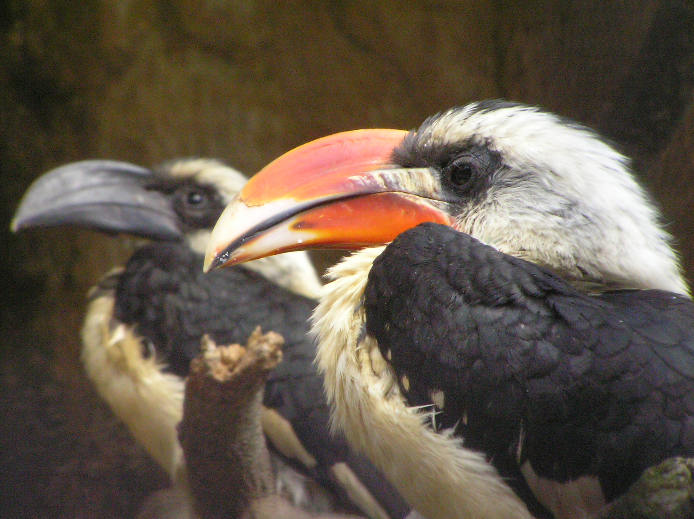 Tockus deckeni, Von der Decken's Hornbill, Von-der-Decken-Toko couple